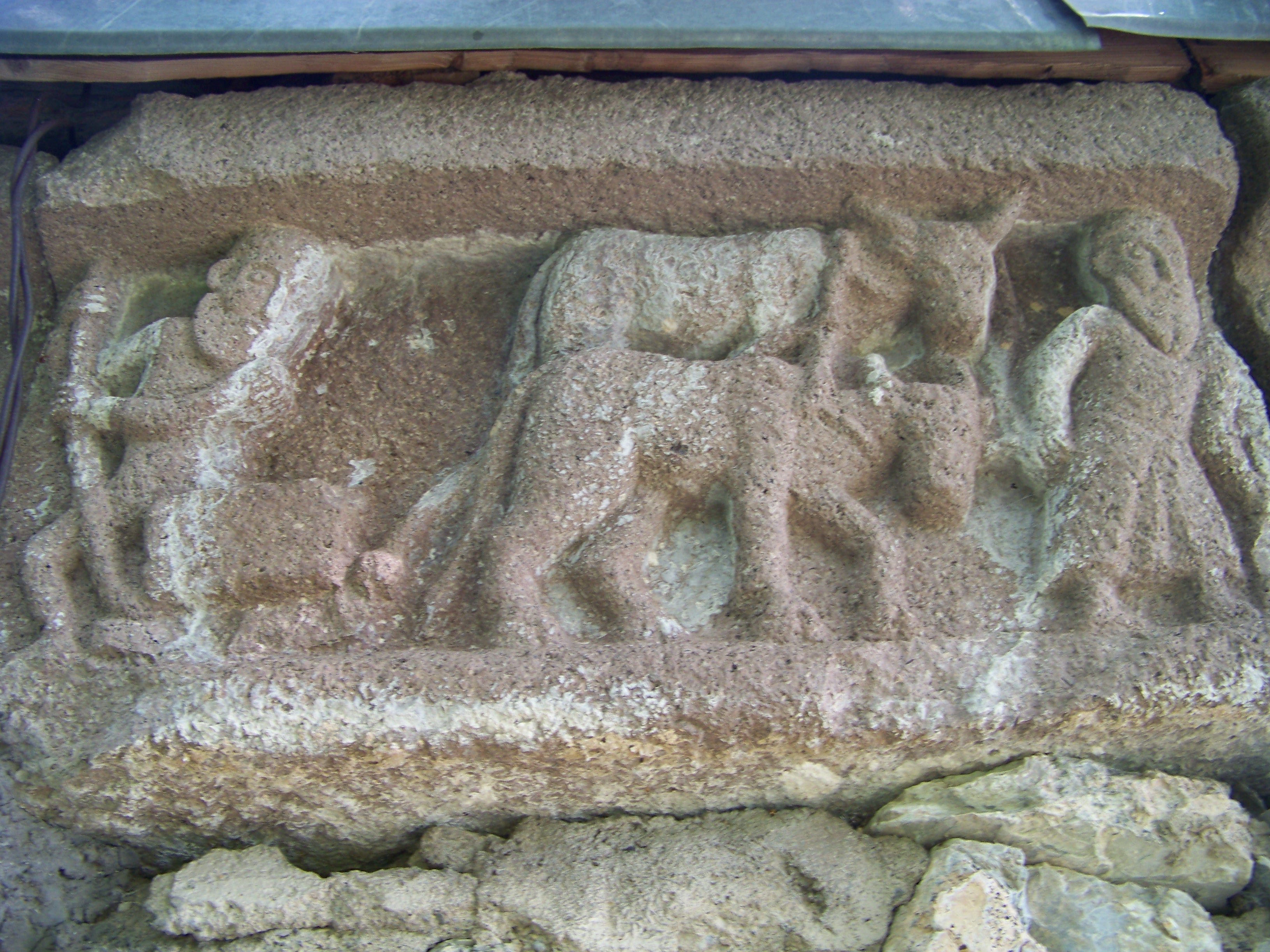 ღვთისმშობლის დარბაზული ეკლესია